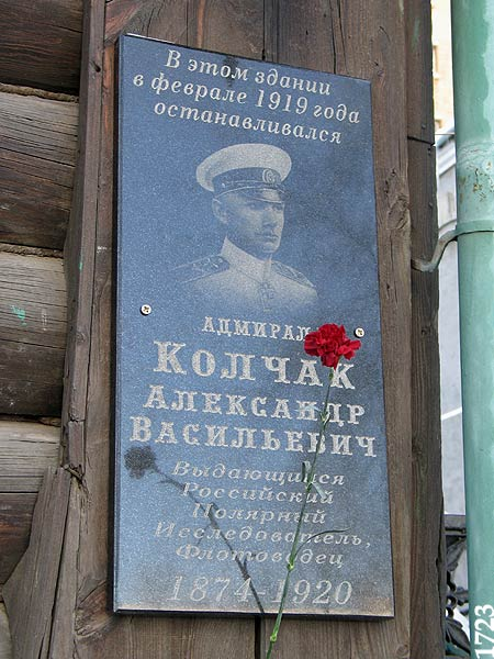 Екатеринбург. Одноэтажный деревянный дом по ул.Февральской революции, 9.